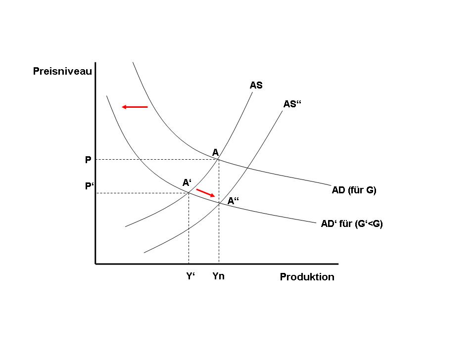 Dynamische Effekte im AS-AD-Modell durch Senkung des Budgetdefizits